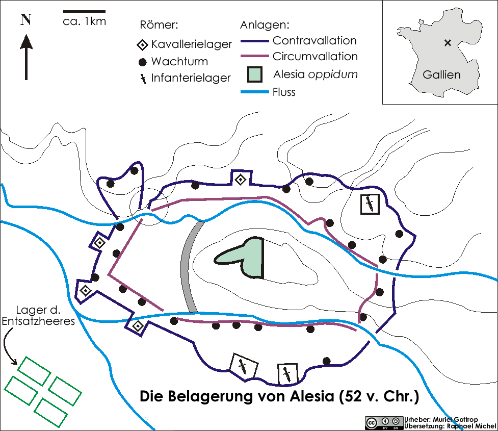 German Translation of SiegeAlesia.jpg Zeichnung der Belagerung im Krieg von Alesia, gezeichnet von Muriel Gottrop im Dezember 2004. Box: Die Lage von Alesia in Gallien (heute Frankreich). Übersetzung von Raphael Michel (Dezember 08)